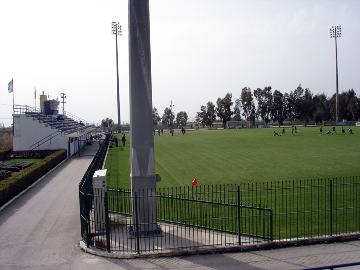 Fotis Aravantinos football center Patras Greece Αθληξτικό κέντρο Φώτης Αραβαντινόε, Θύελλα Πατρών .